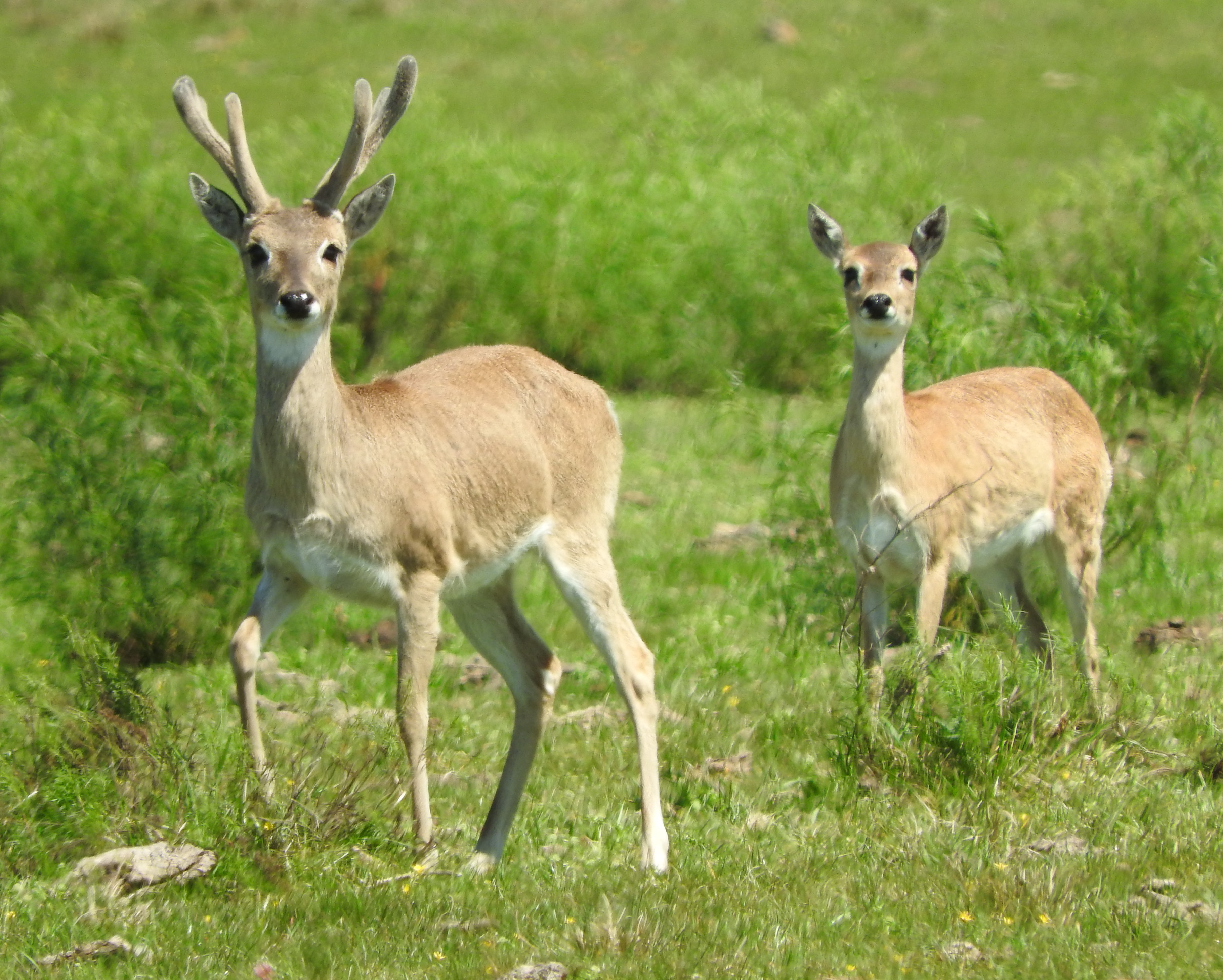 Ozotoceros bezoarticus arerunguaensis fotografiados en Arerunguá, setiembre 2016